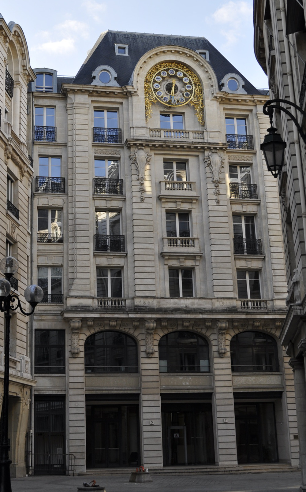 Immeuble 5 rue des italiens à Paris. L'immeuble date de 1911 et a été successivement occupé par : - Journal Le Temps jusqu'en 1942 - Journal Le Monde (propriétaire) de sa création en 1944 et 1989 - Tribunal de grande instance de Paris (pôle économique et financier et pôle de santé publique) et certains services du ministère de la Justice, locataires depuis 1999, jusqu'au déménagement à la cité judiciaire.